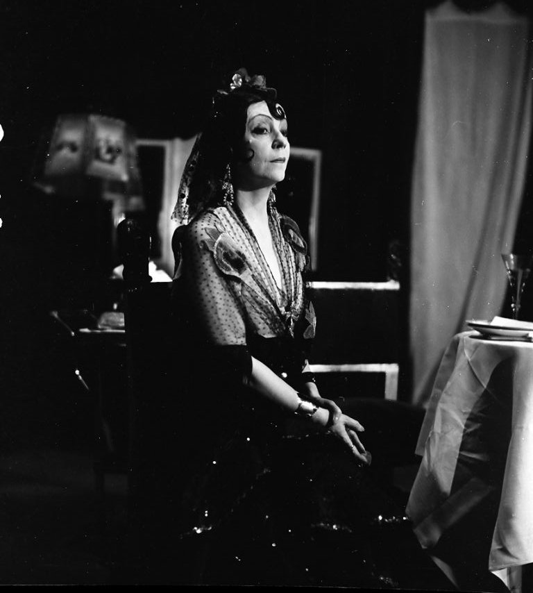 Kabarett der Komiker: Asta Nielsen; in: "Kriminalsketch Zimmer 16"; (Profil)